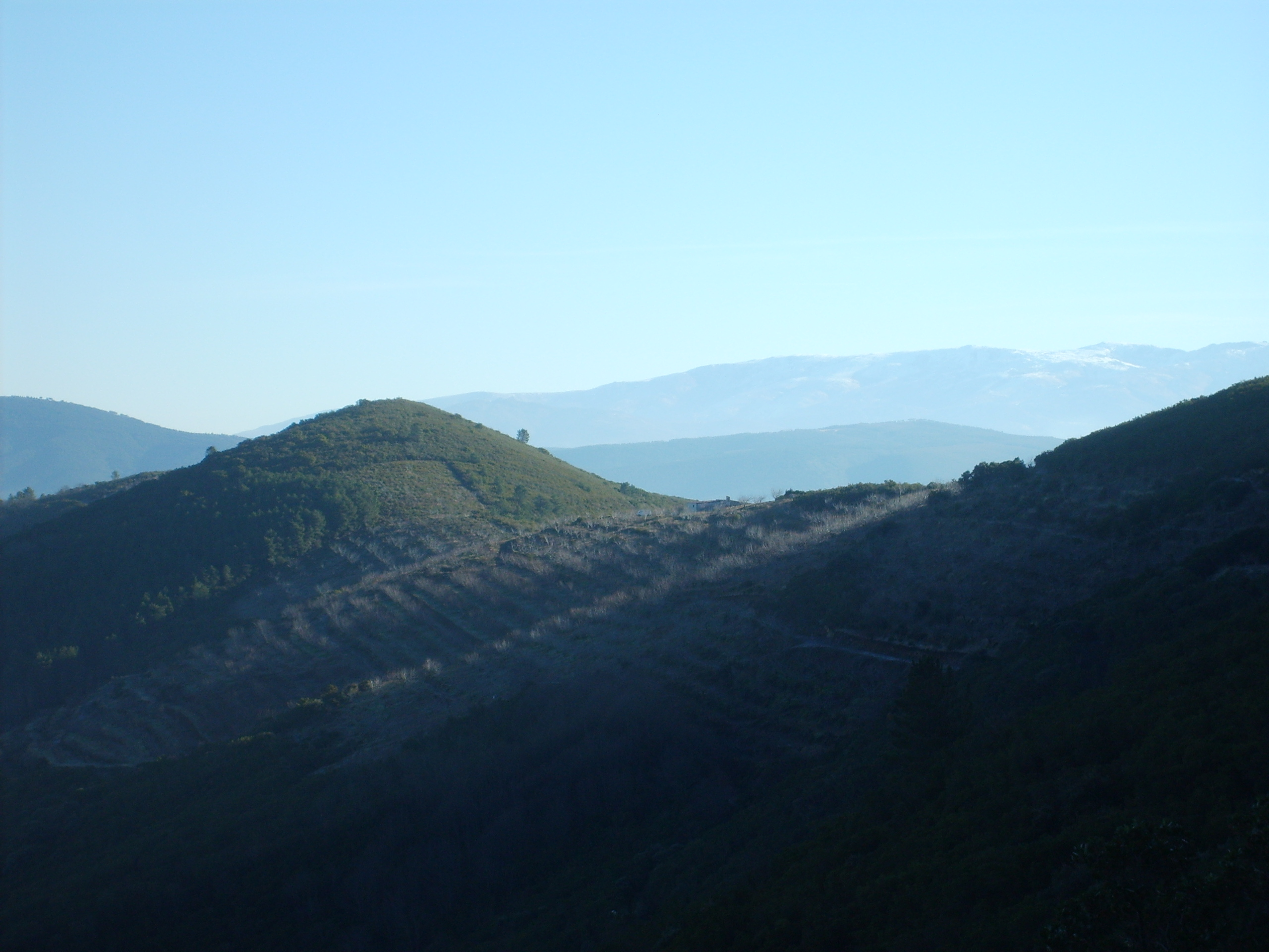 Estremeñu: los cerezus